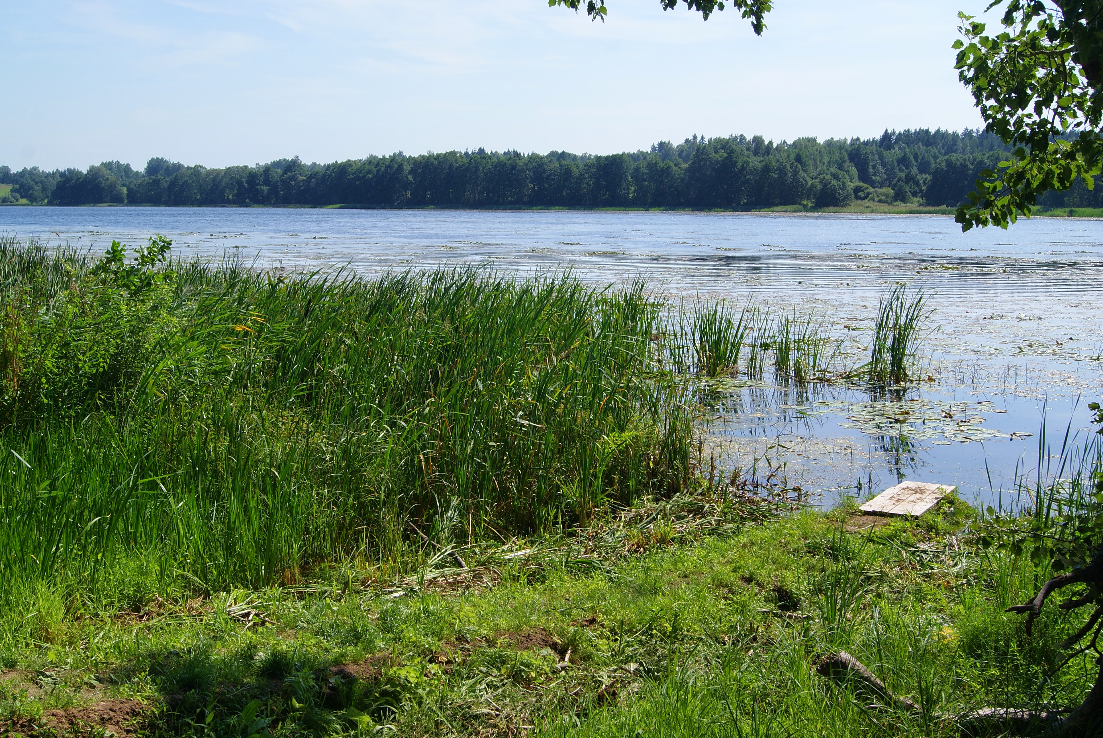 Antanašė 42223, Lithuania